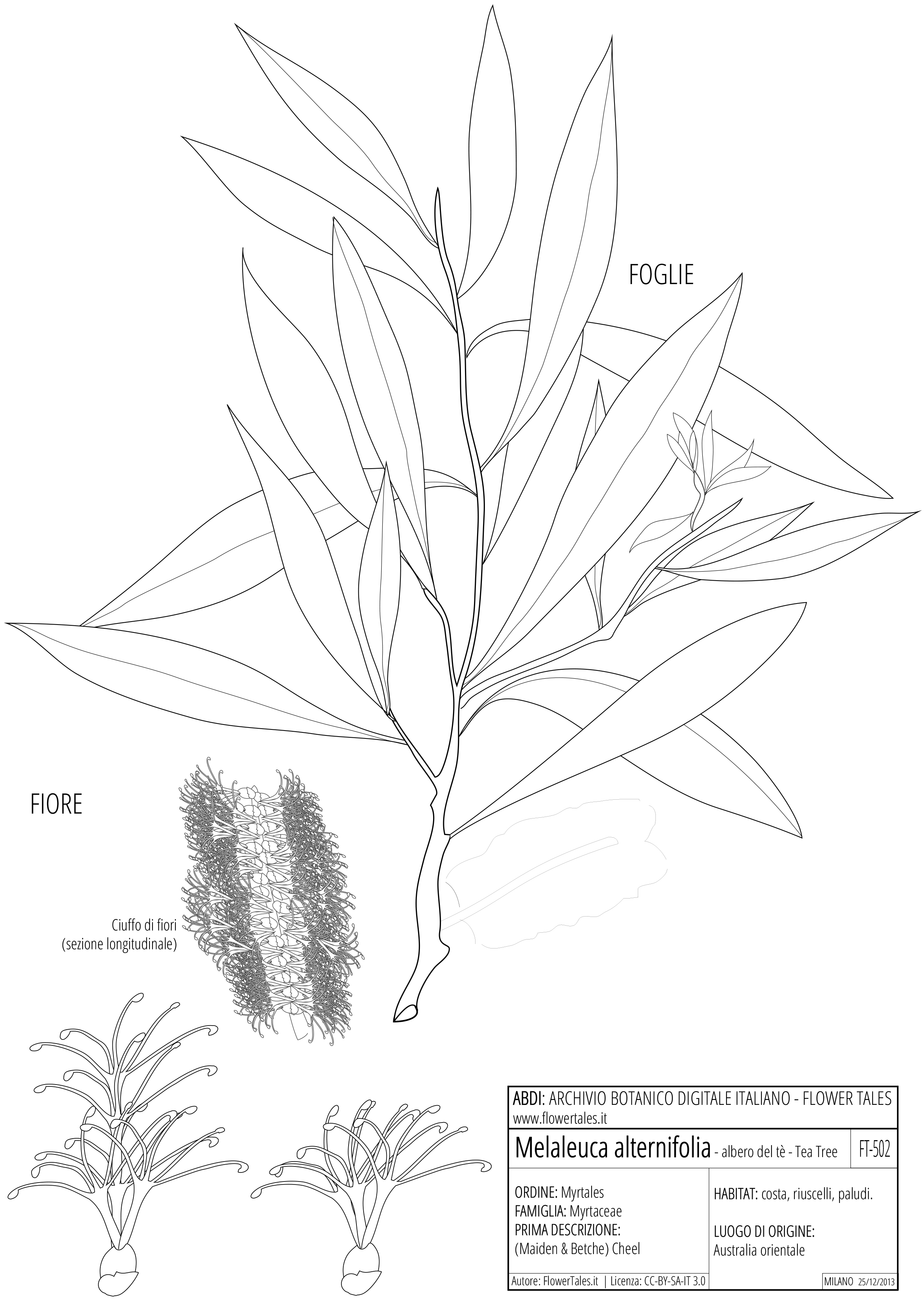 ABDI - ARCHIVIO BOTANICO DIGITALE ITALIANO - Flower Tales Reperto #502: Melaleuca alternifolia Illustrazione botanica con scheda descrittiva. Versione a licenza libera realizzata per